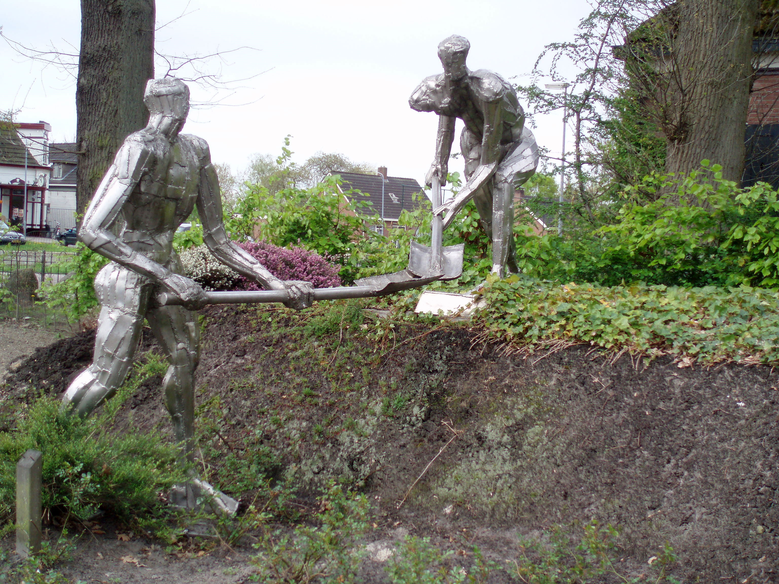 Kunsterwerk De Kanaalgravers (1988) by Willem Kind in Erica.